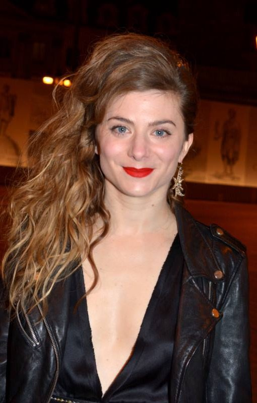 Sarah Suco au dîner des révélations des César du cinéma